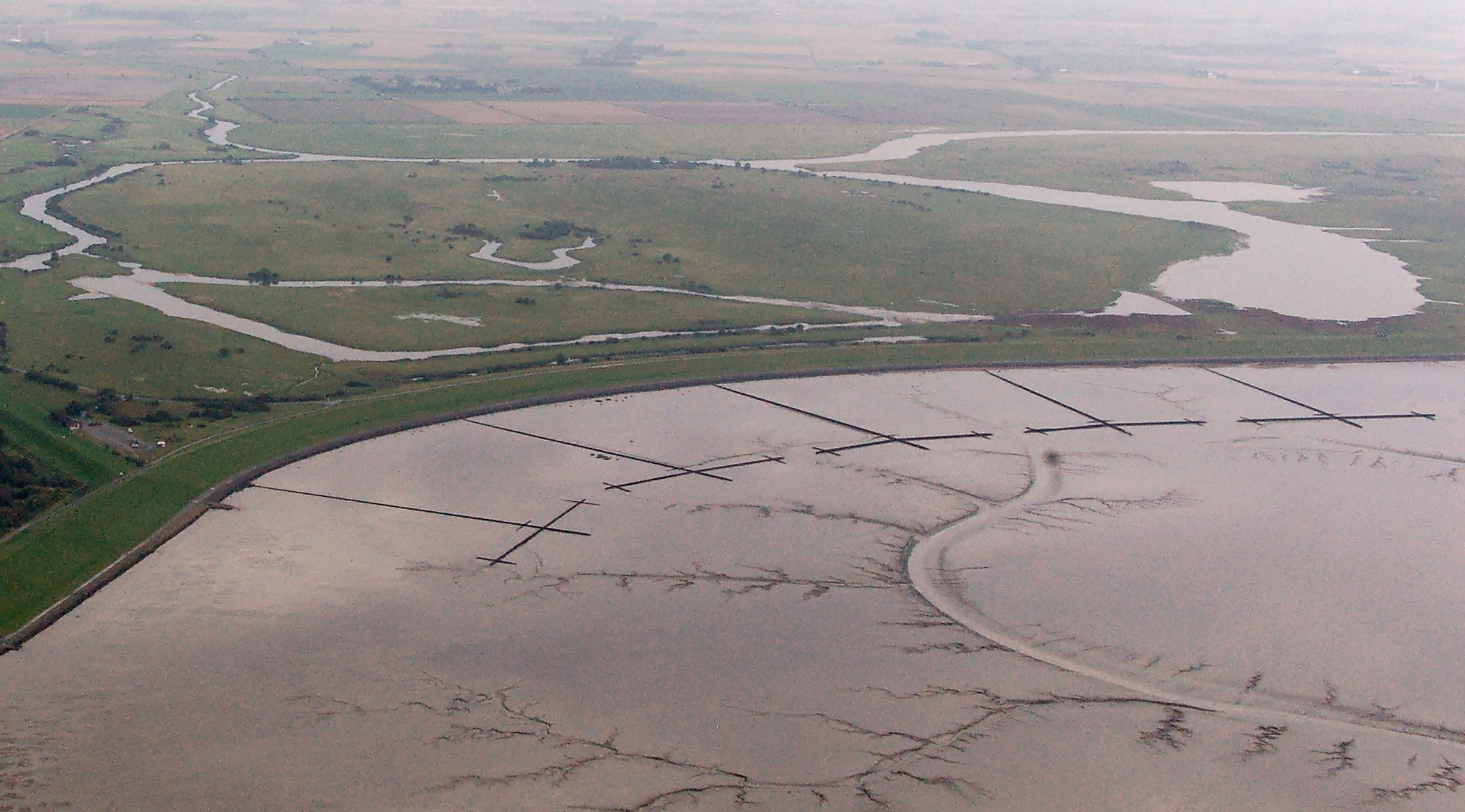 Fotoflug September 2011; Nordseeküste mit Watt und Nordteil des Naturschutzgebiets Wöhrdener Loch im Speicherkoog, Warwerort/Nordermeldorf, Kreis Dithmarschen, Schleswig-Holstein, Deutschland